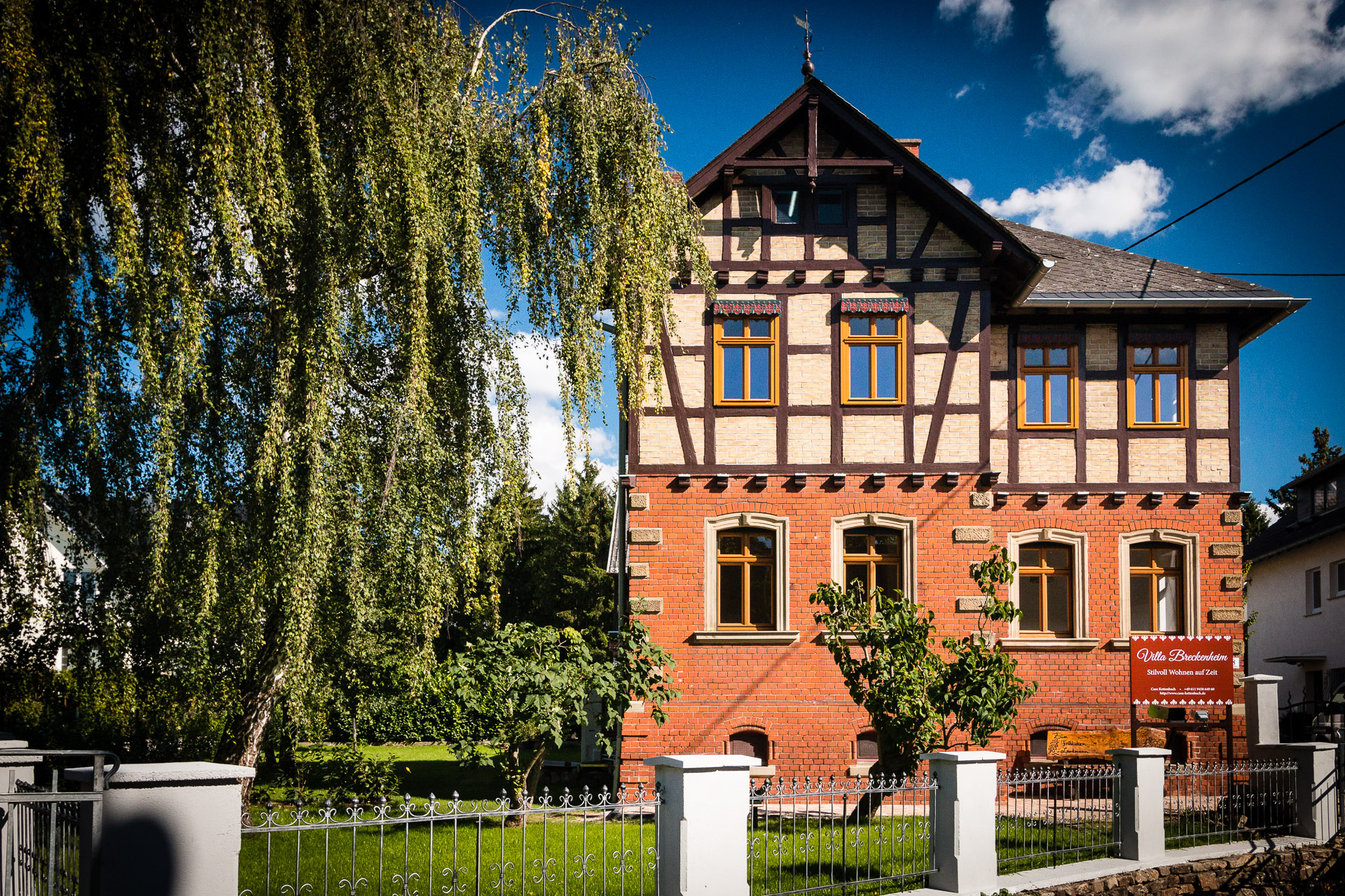 Die Villa Breckenheim, erbaut zwischen 1894 und 1904, im Jahr 2015.